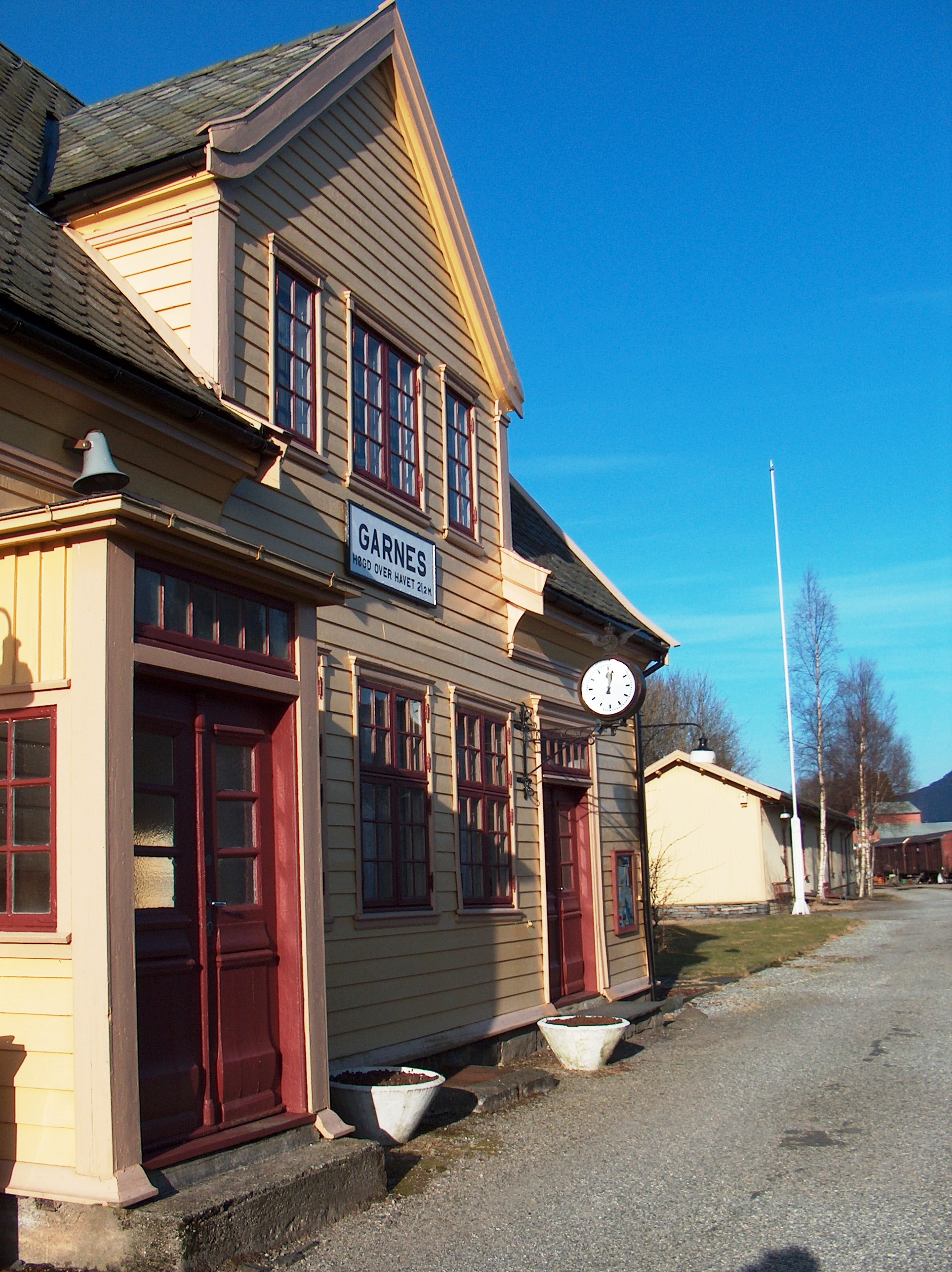 Garnes stasjon, Bergen in Norway.